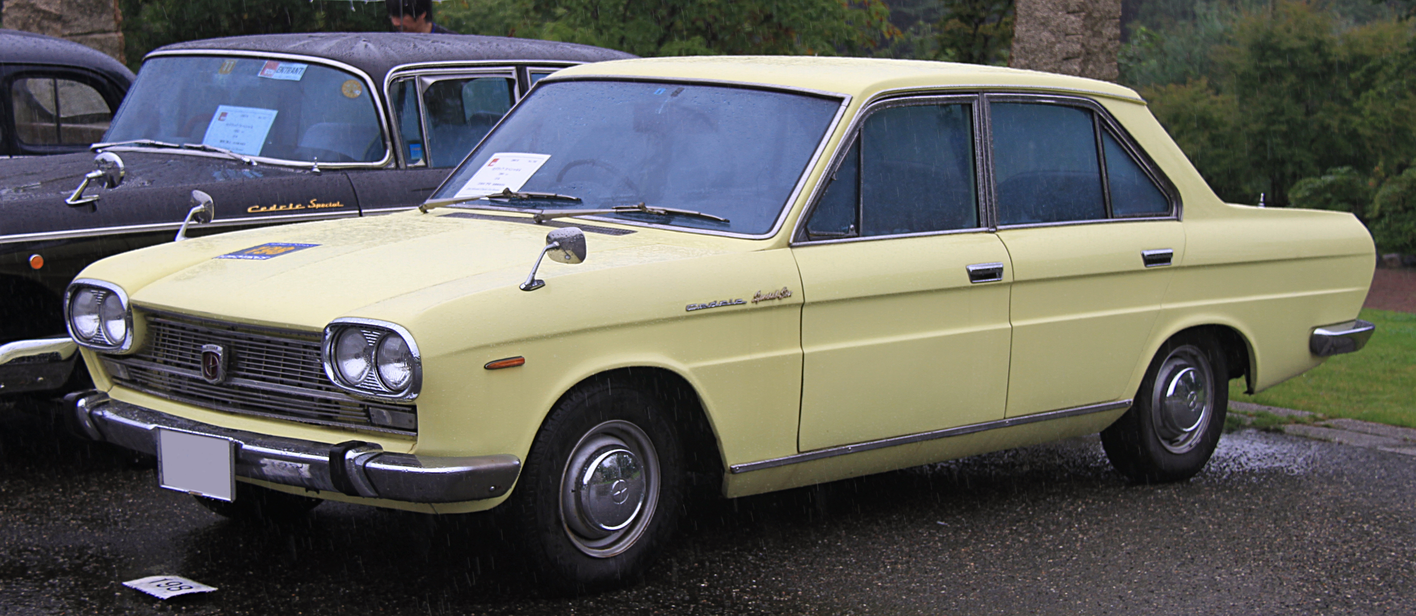 Nissan Cedric 130